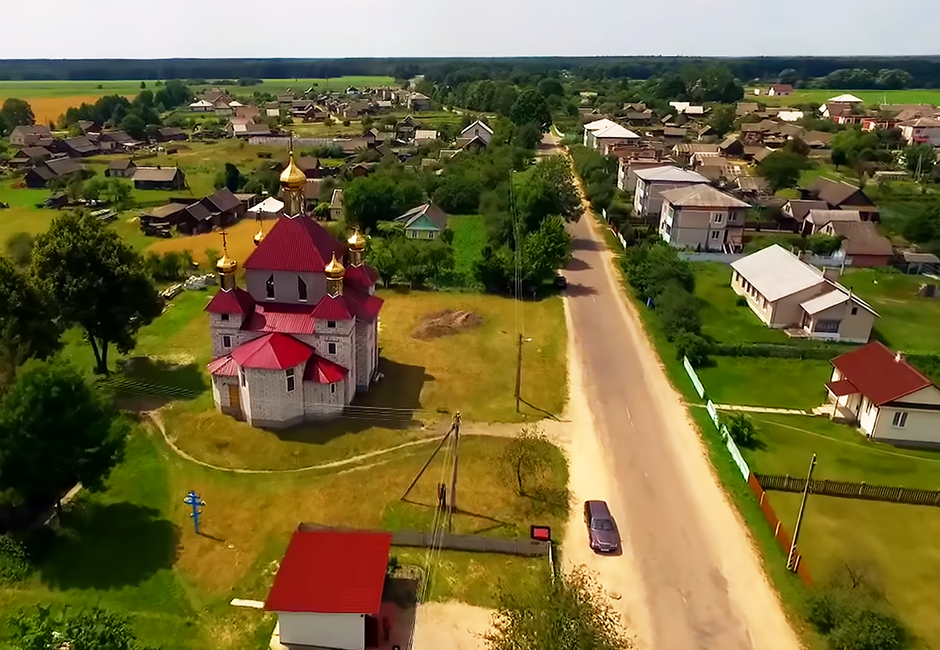 Строящаяся церковь